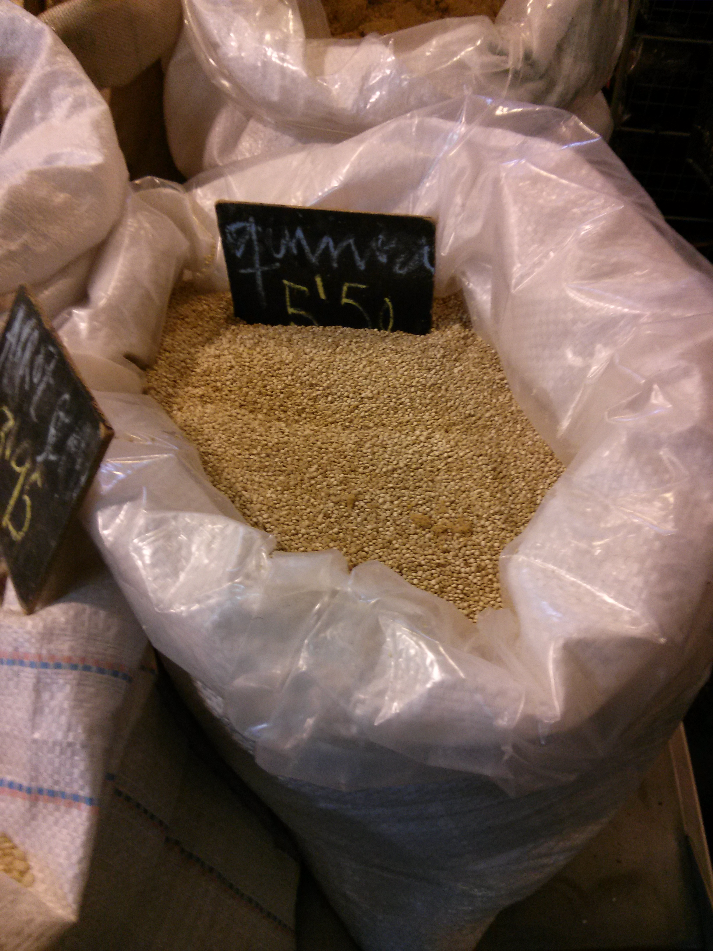 Foto de un saco de Quinoa en un puesto de verdura ecológica del mercado de Lavapies en Madrid.